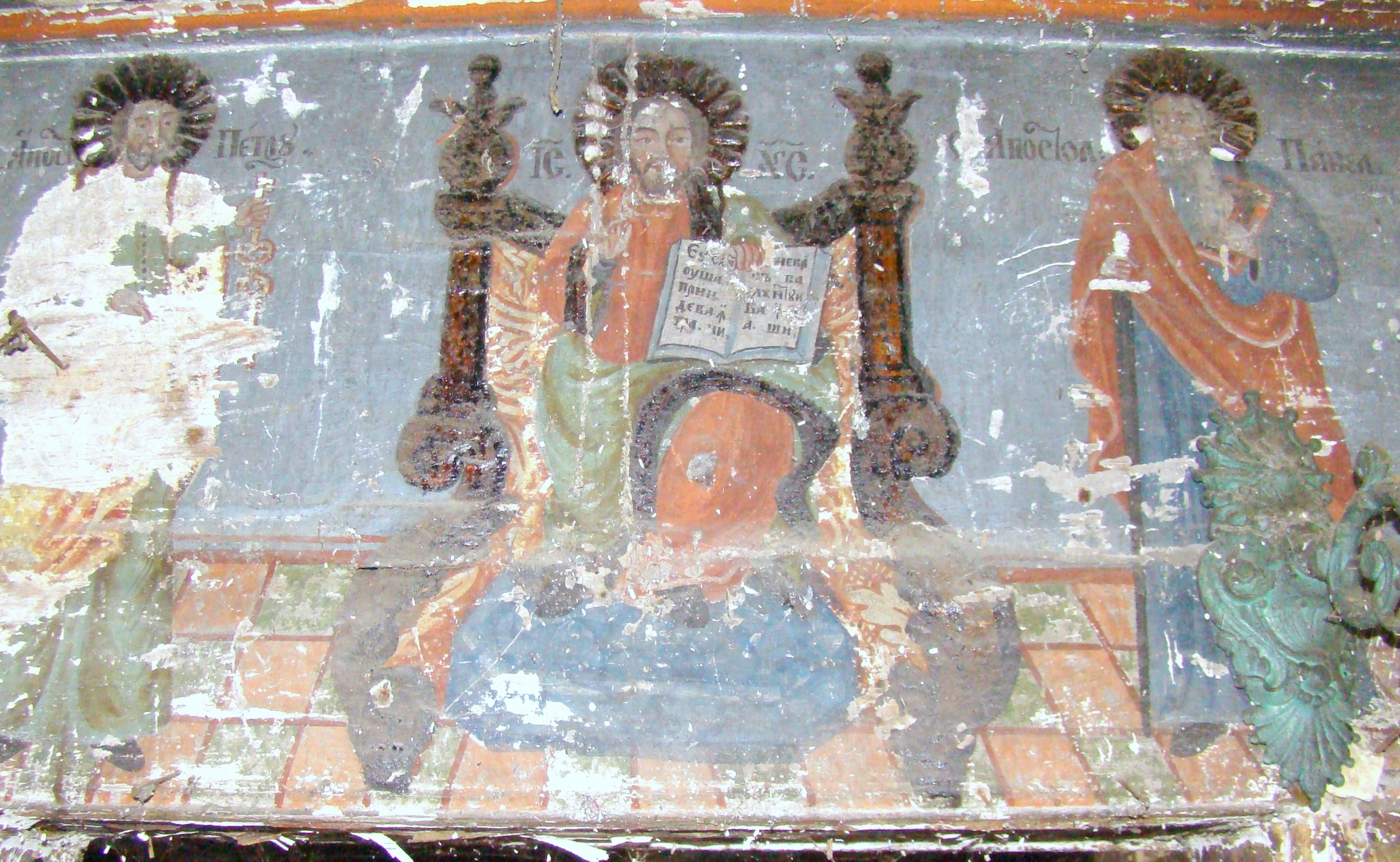 Biserica de lemn din Silivaș, județul Cluj